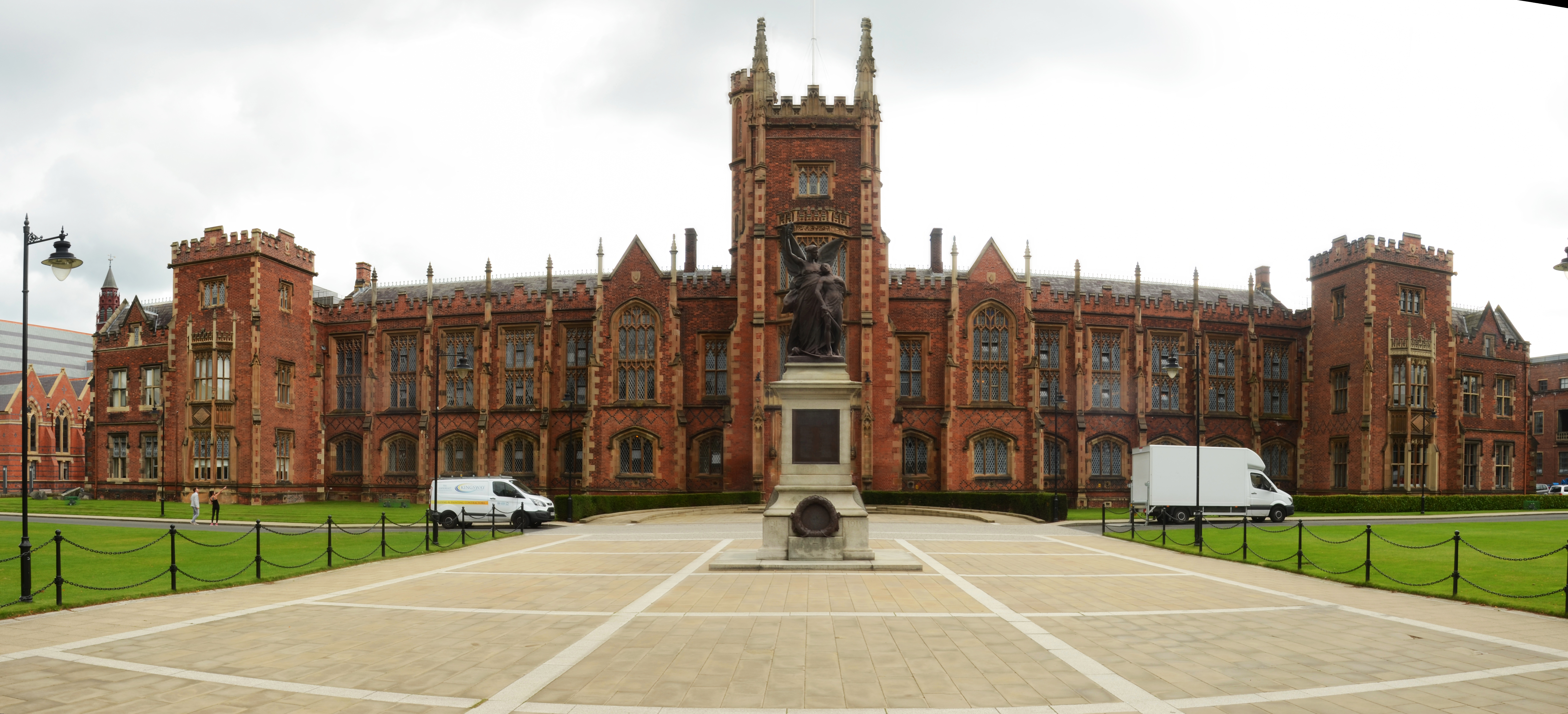 Een gebouw van de Queen's University Belfast.